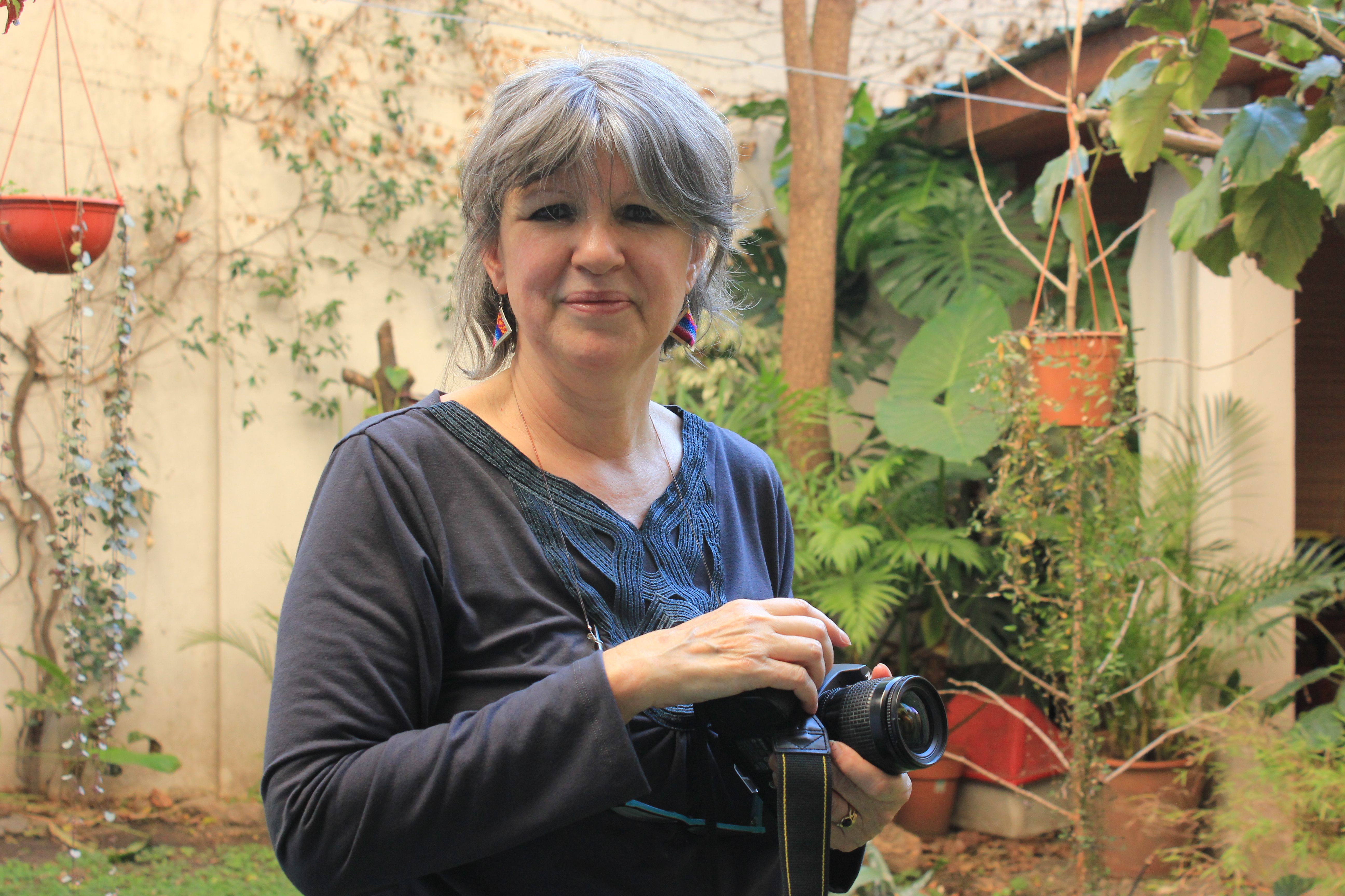 Retrato de Mónica Hasenberg.